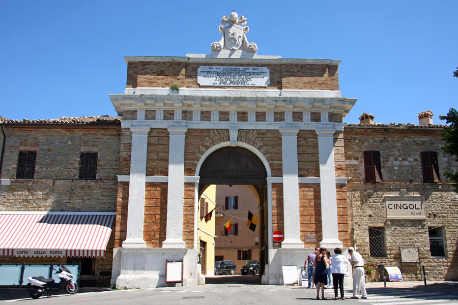 Porta Piana, accesso al centro storico di Cingoli (MC); eretta nel 1835 in onore di Papa Pio VIII., figlio di Cingoli, morto nel 1830 ([1])